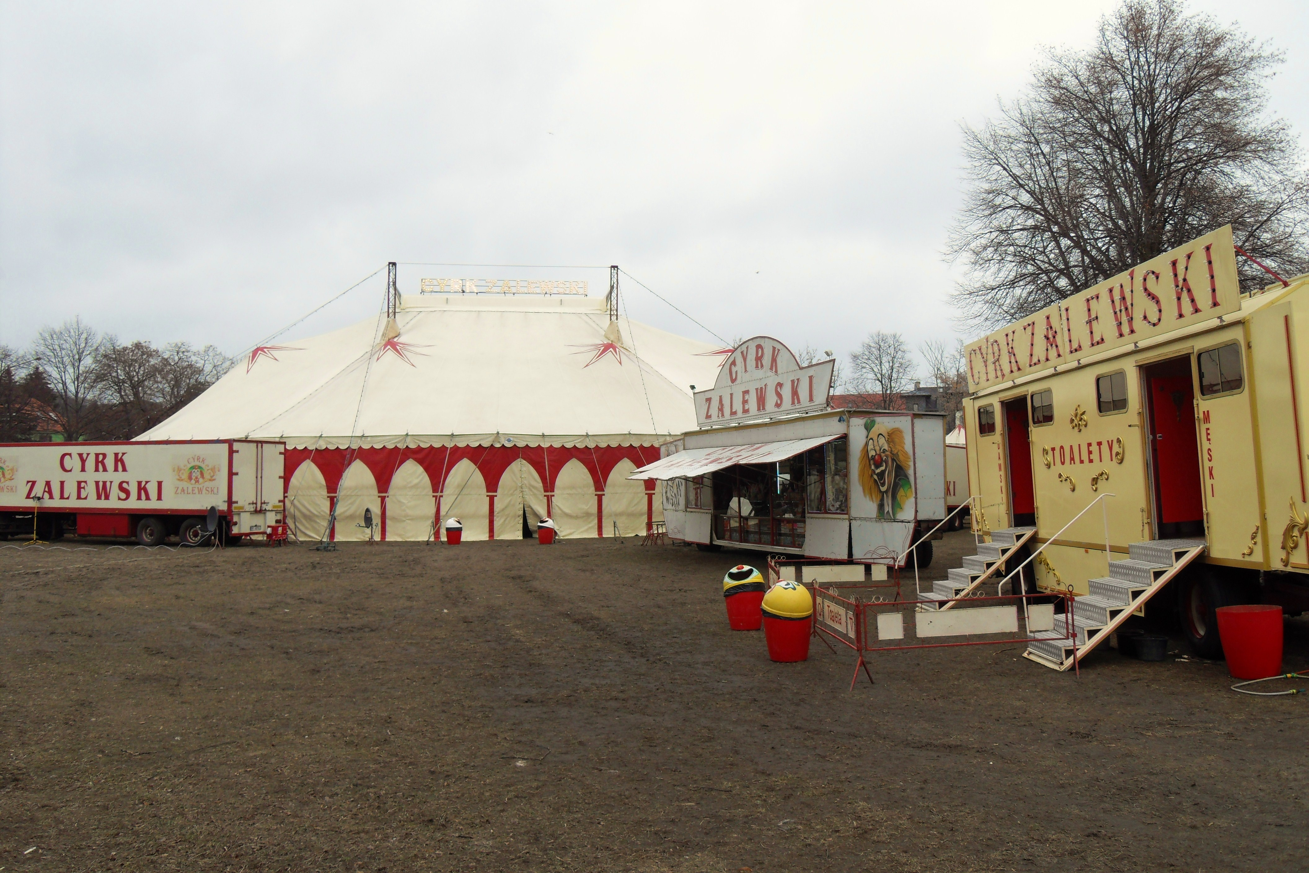 Cyrk Zalewski w Gdańsku Oliwie, przy ul. Wita Stwosza.